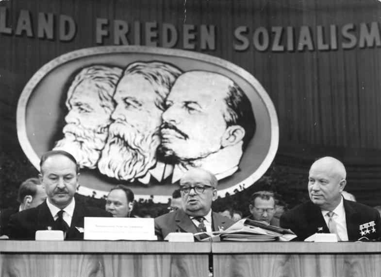 Zentralbild Kollektiv Me-Qu 15.1.1963 VI. Parteitag der SED vom 15.-21.1.1963 in der Werner-Seelenbinder-Halle in Berlin (1.Tag). UBz. Im Präsidium v.l.n.r.: Boris Ponomarjow, Sekretär des ZK der KPdSU, das Mitglied des Politbüros des ZK der SED Friedrich Ebert und der Erste Sekretär des ZK der KPdSU, N.S. Chruschtschow. (Heilig)